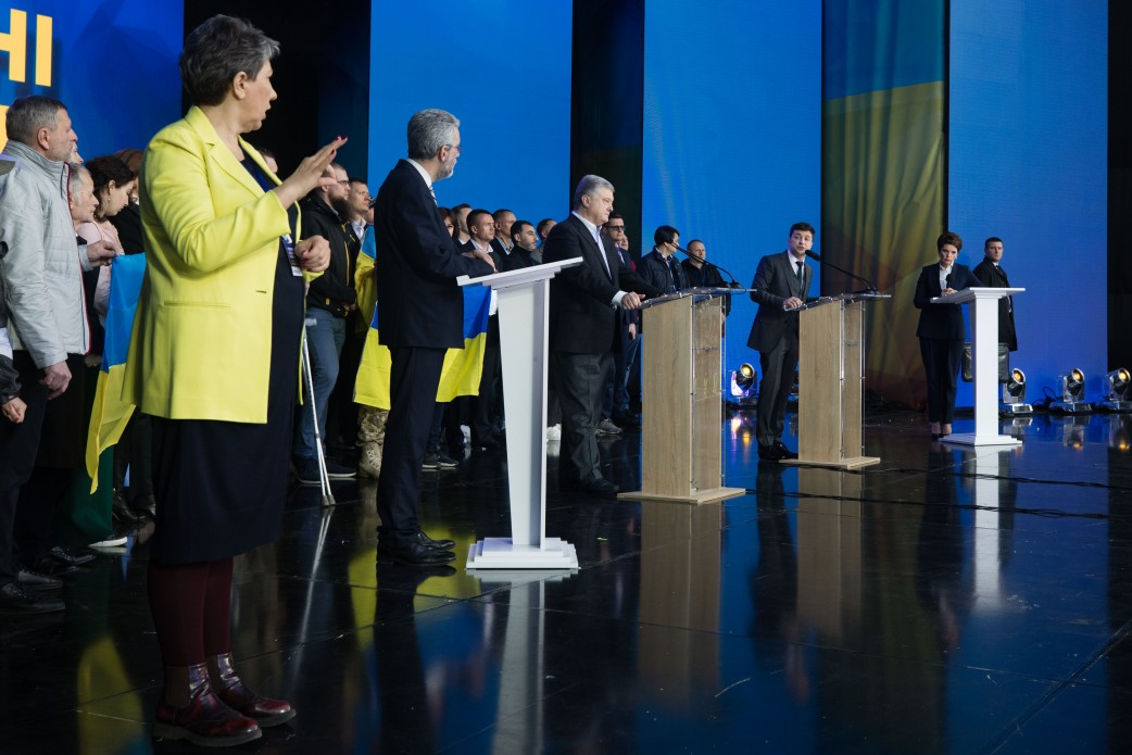 Дебаты кандидатов на пост Президента Украины Петра Порошенко и Владимира Зеленского